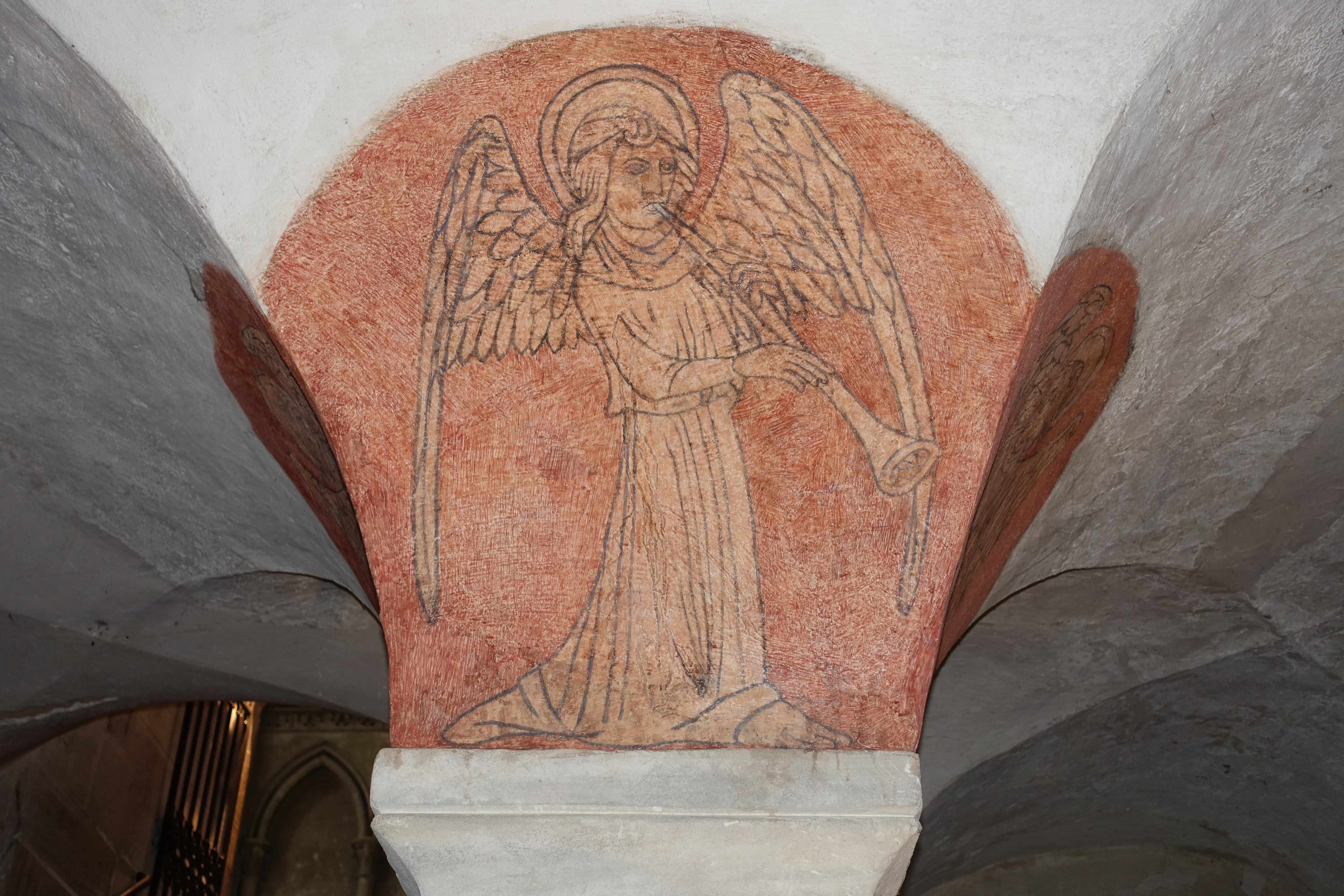 Crypte van de kathedraal van Bayeux, musicerende engel, Chalumeau